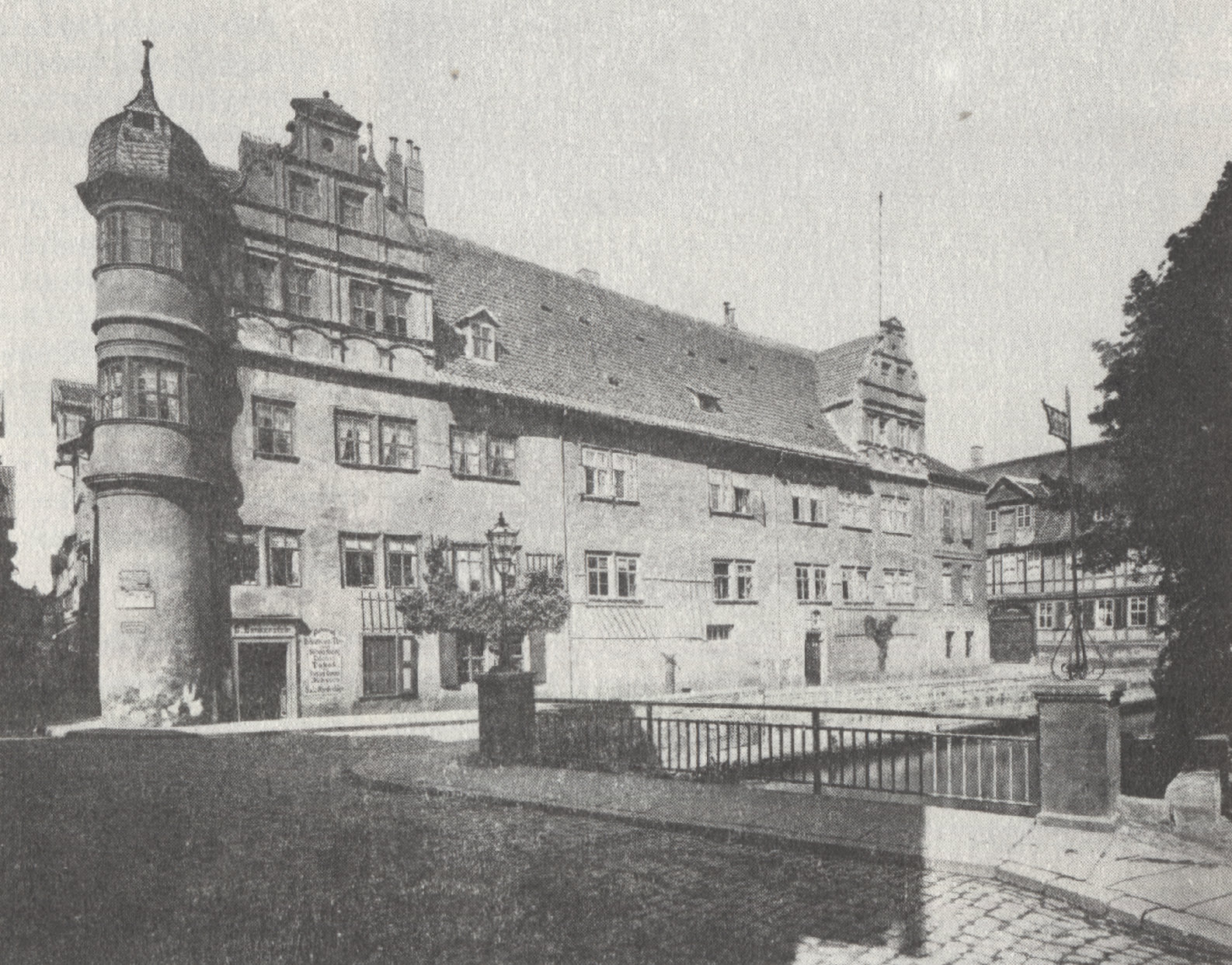 Hagensches Freihaus in Quedlinburg, Meßbildaufnahme